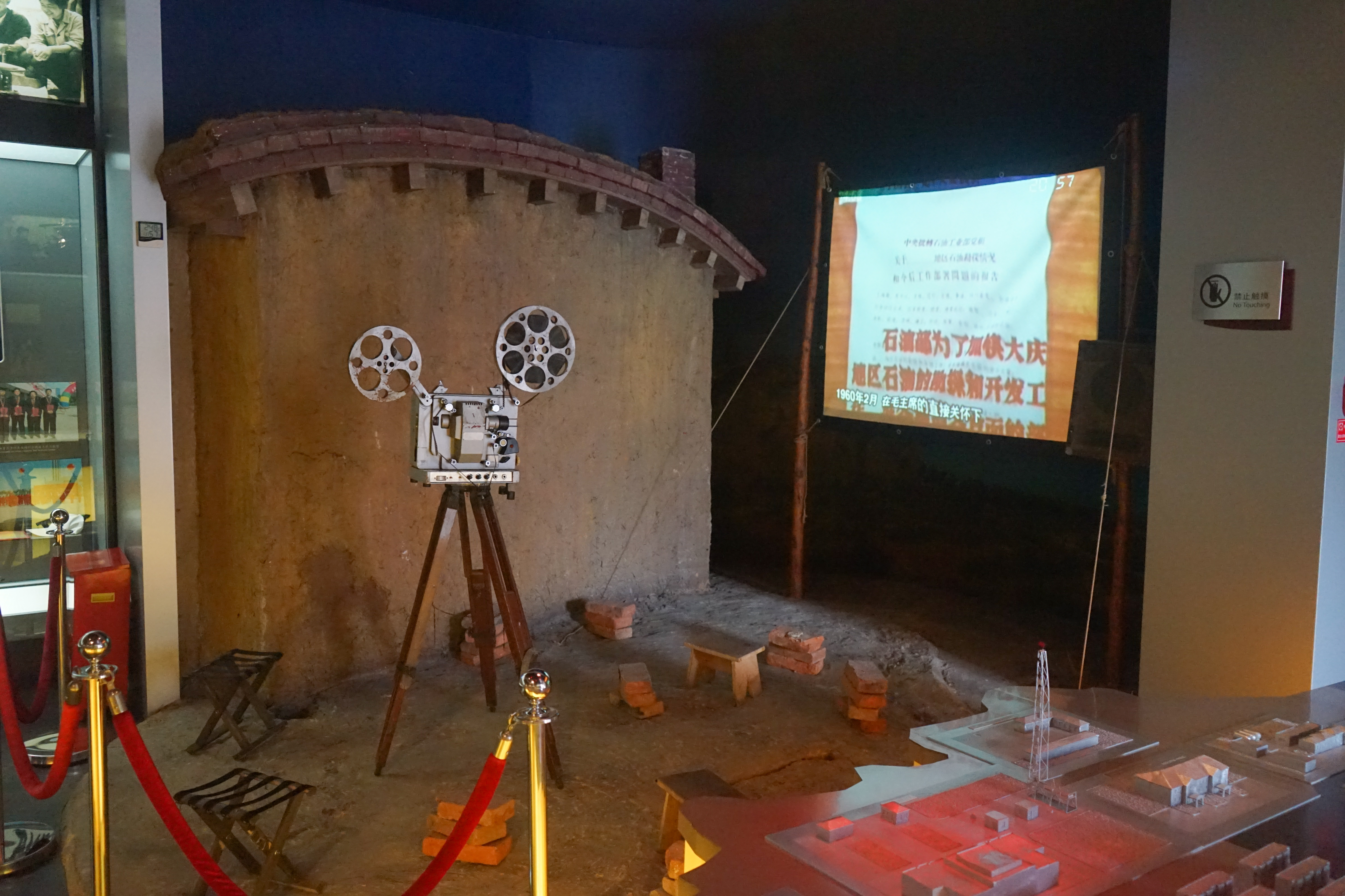 中文（中国大陆）: 大庆油田影院（复原场景），油田历史馆